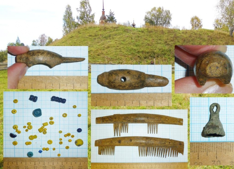 Коллаж с отдельными находками из горизонта IX-XI вв на городище Унорож